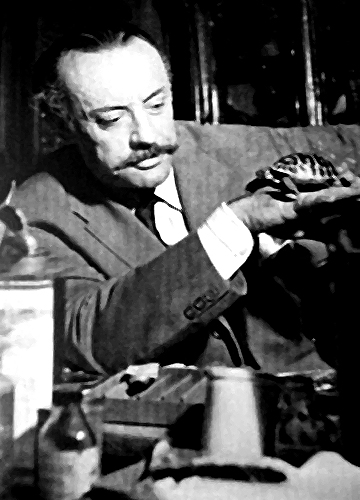 Luigi Zuccheri (1904 - 1974)